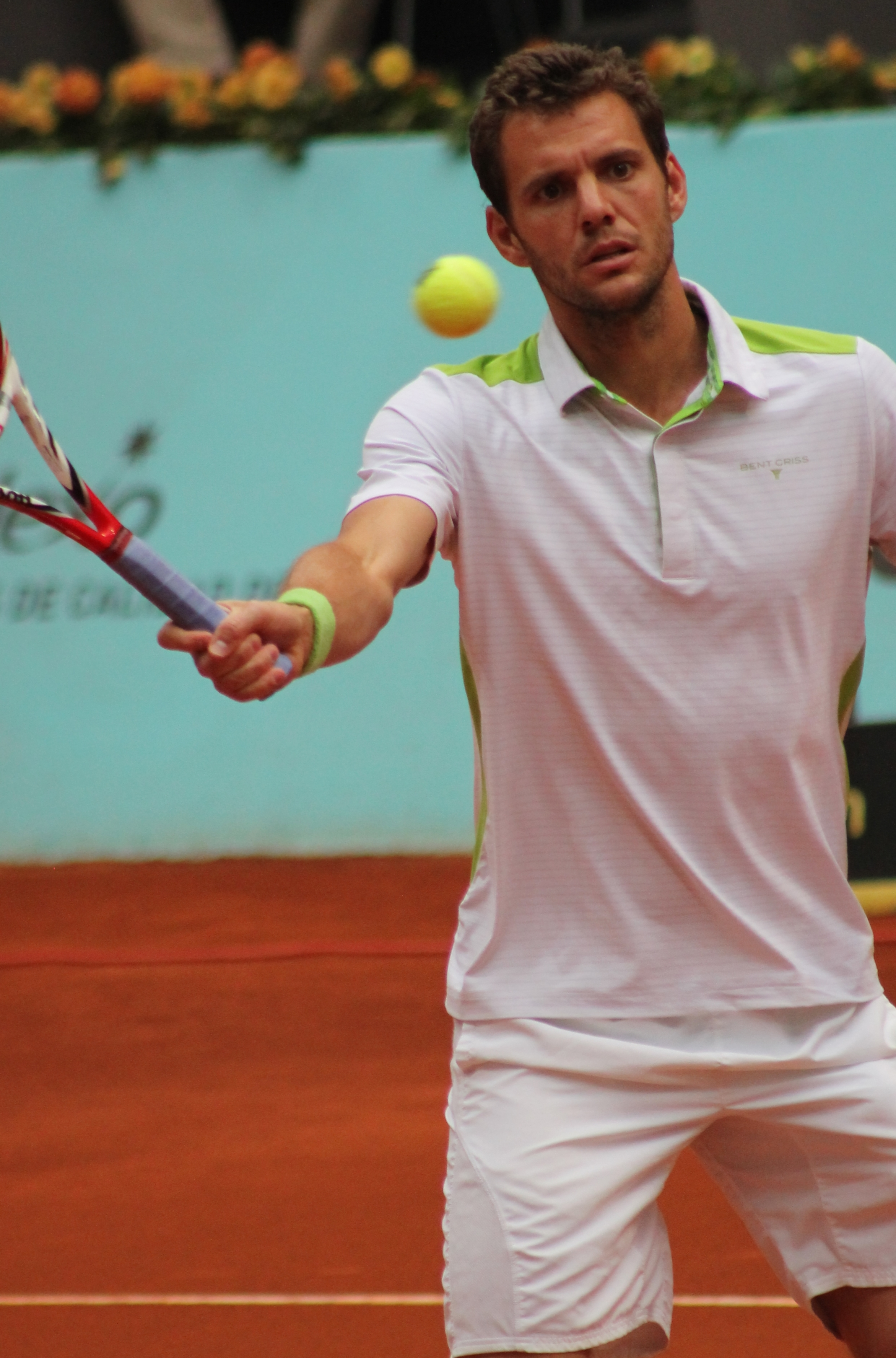 Mathieu MA14 - Copy (3)